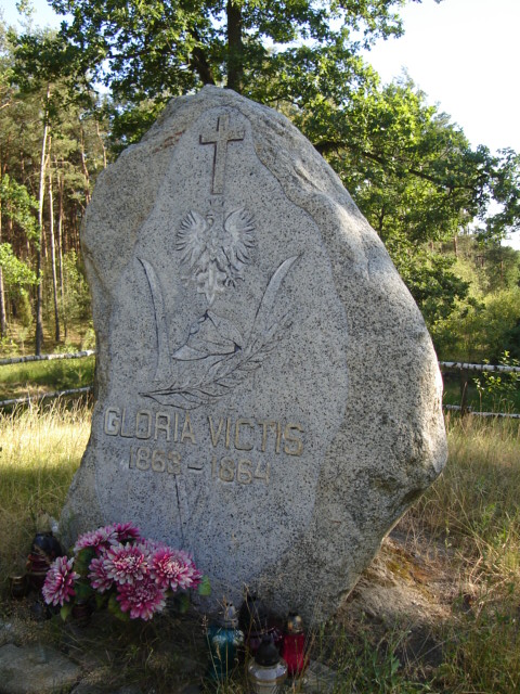 Moje zdjęcie - Sacały (gmina Brudzew)